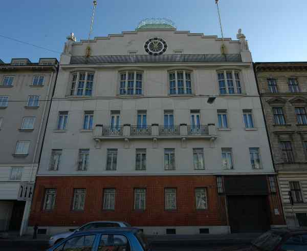 Bildbeschreibung: Vorwärts-Gebäude Quelle: GuentherZ Fotograf/Zeichner: GuentherZ Datum: 2006-01-21 andere Versionen